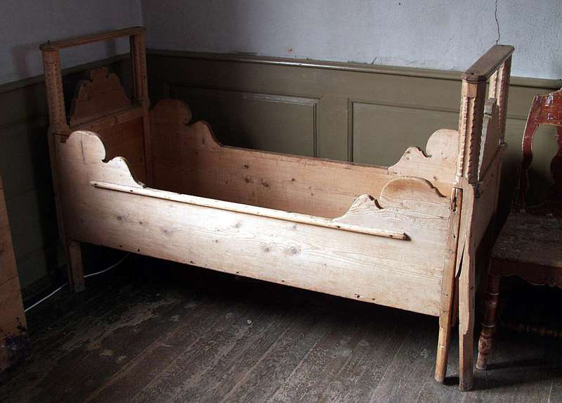 Skuvseng i furu fra Verdal i Nord-Trøndelag. Lengde 174 cm. Norsk Folkemuseum, NF.1930-0417.